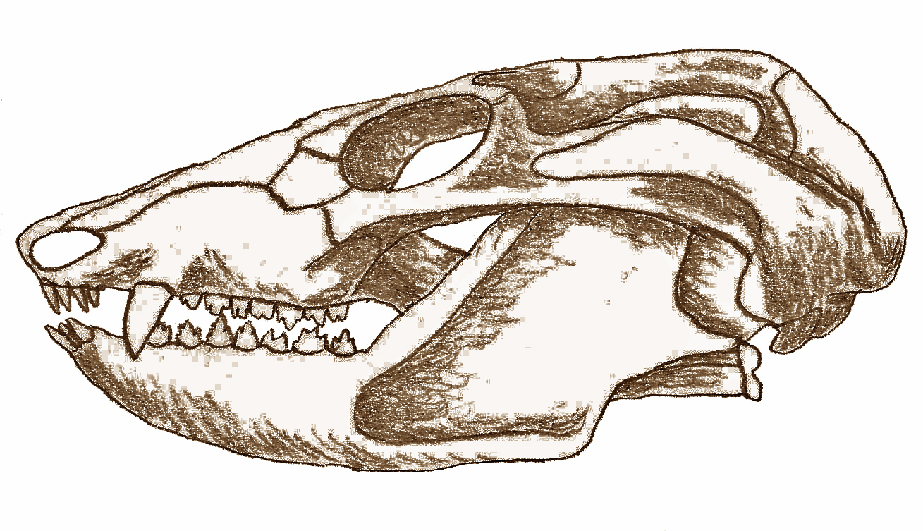 Skull restoration Probainognathus